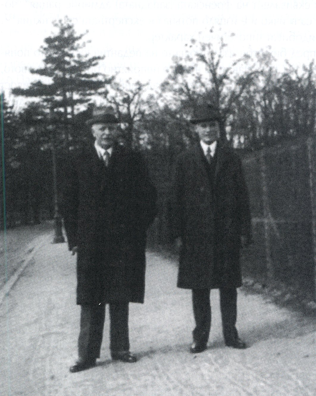 Никола Мушанов и Никола Стоянов по време на посещение в Лондон за преговори по външния дълг